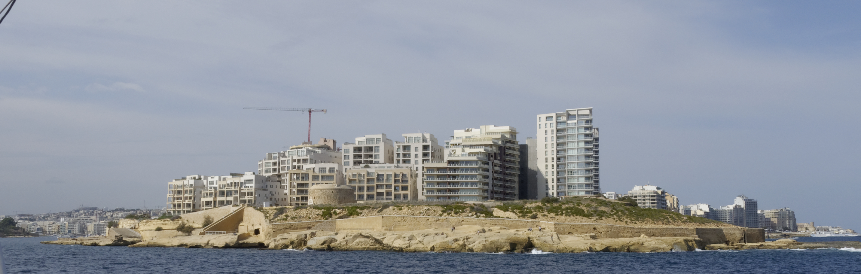 Malta-mix- 2019